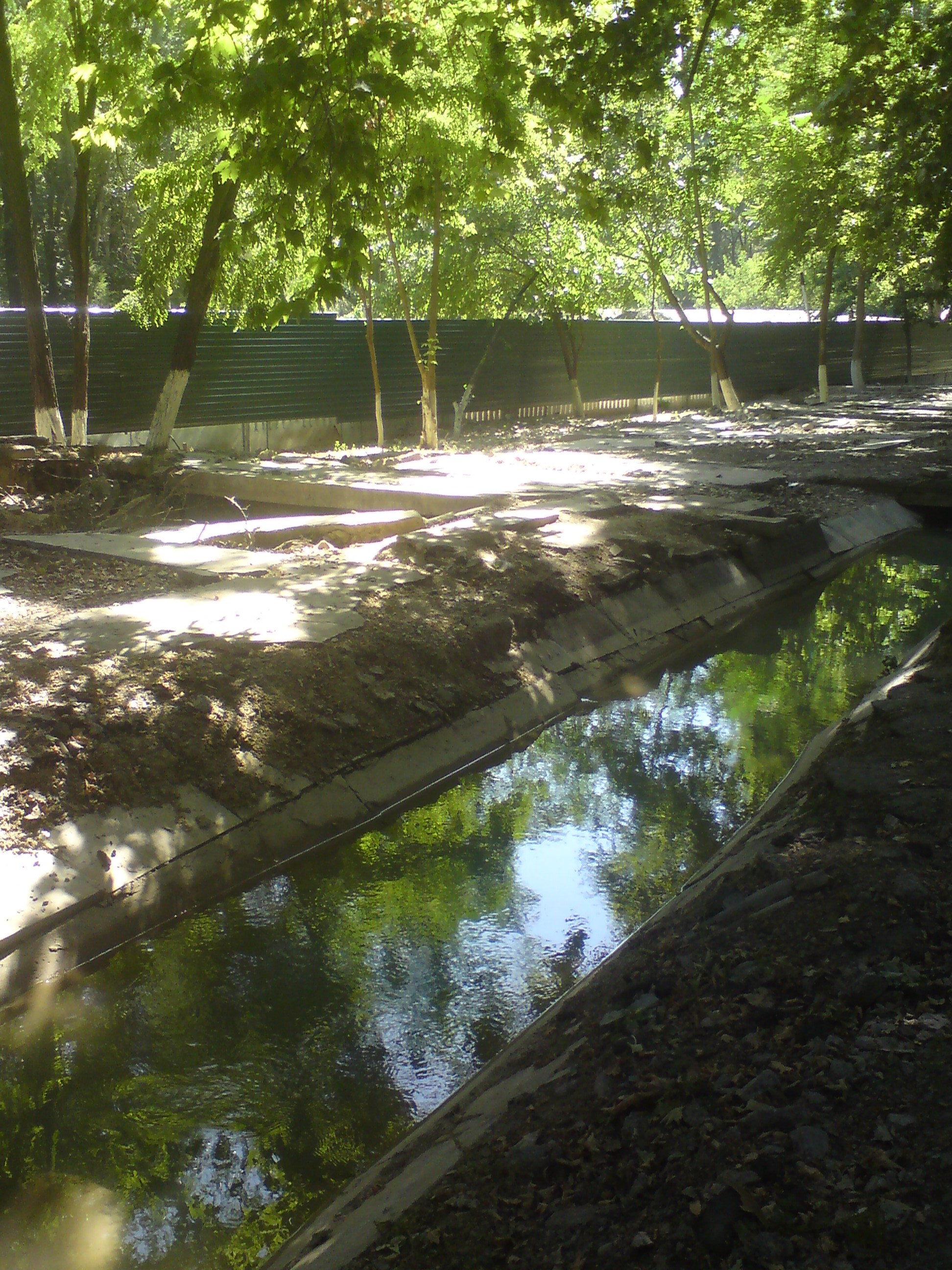 Канал (арык) Чапаната (Чупаната), отвод канала Анхор, близ парка им. Гафура Гуляма, Чиланзарский район, Ташкент